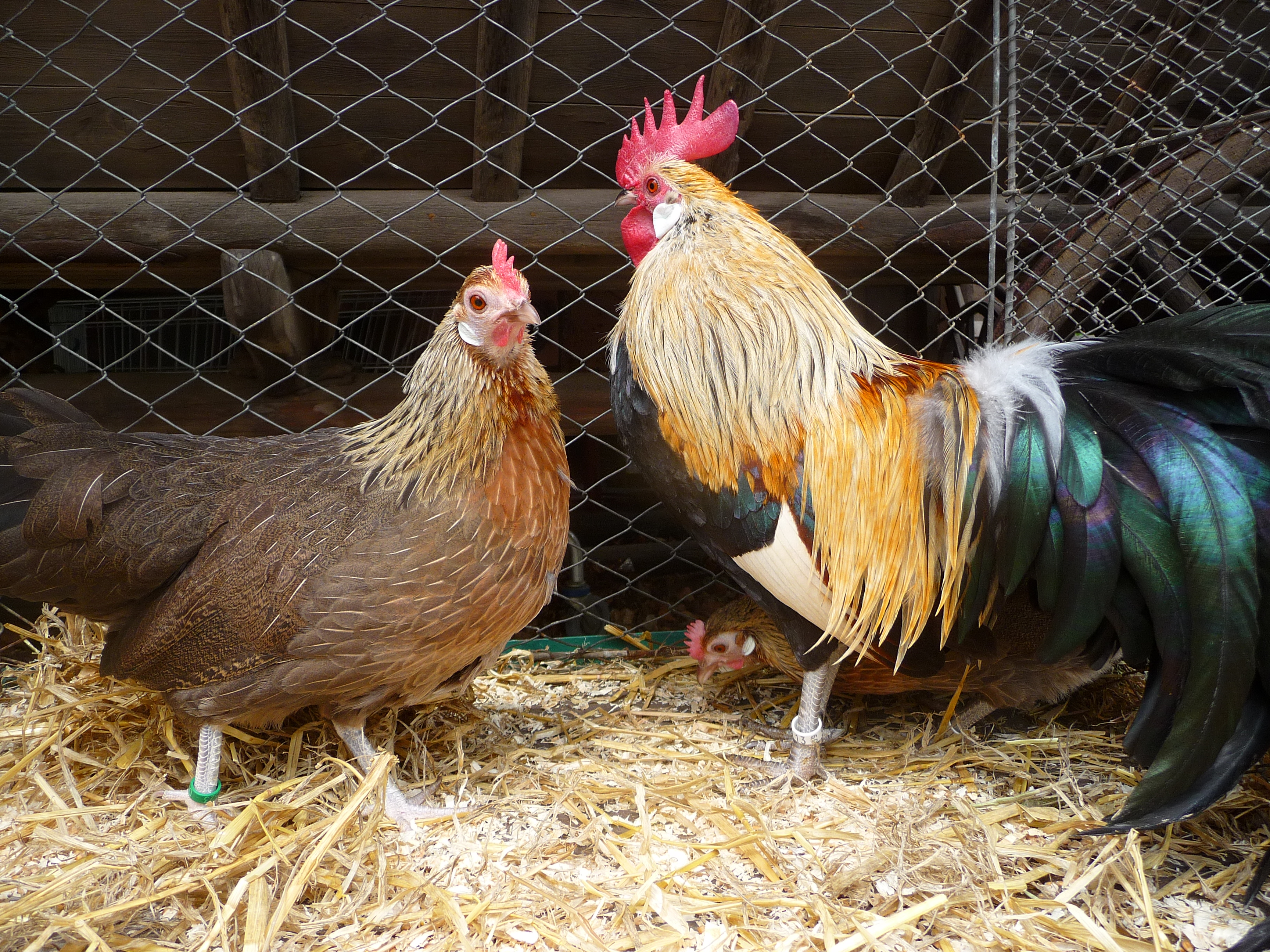 Italiener, Haushuhnrasse, hier Hahn und Henne, fotografiert in Baden-Württemberg, Deutschland)